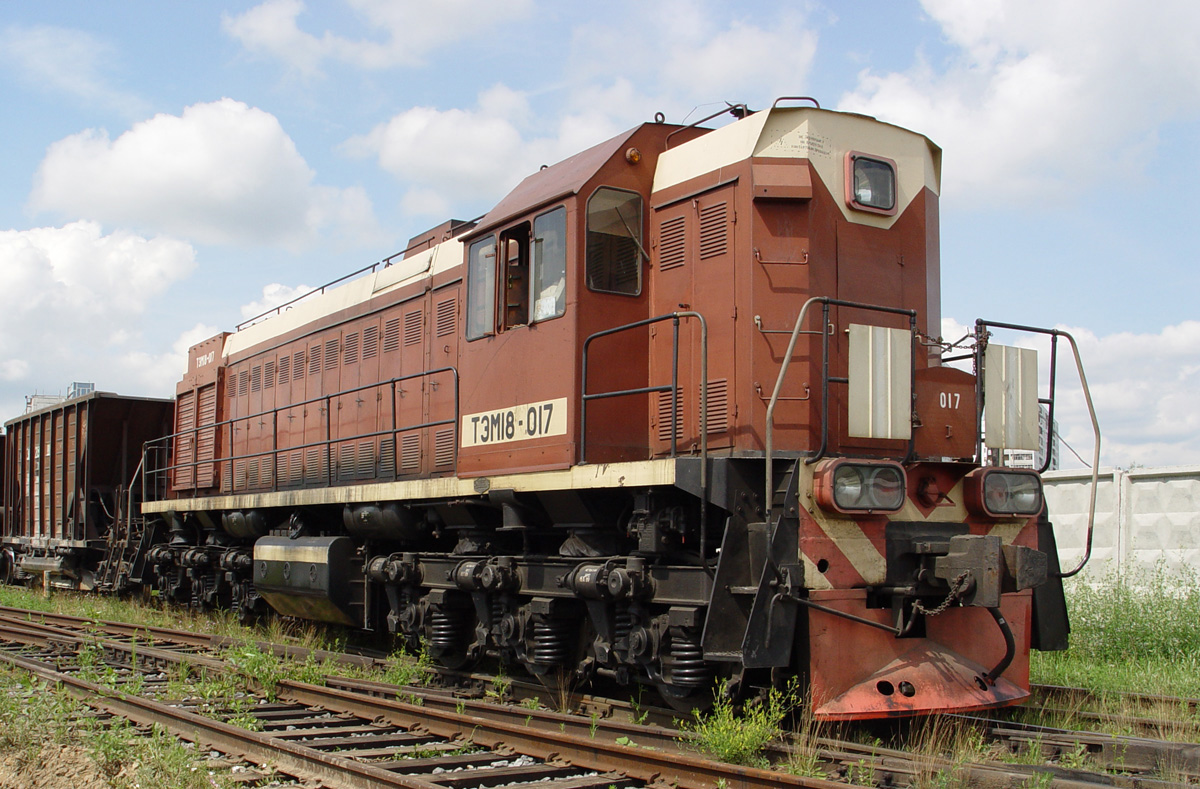 Тепловоз ТЭМ18-017 на подъездных путях в Москве